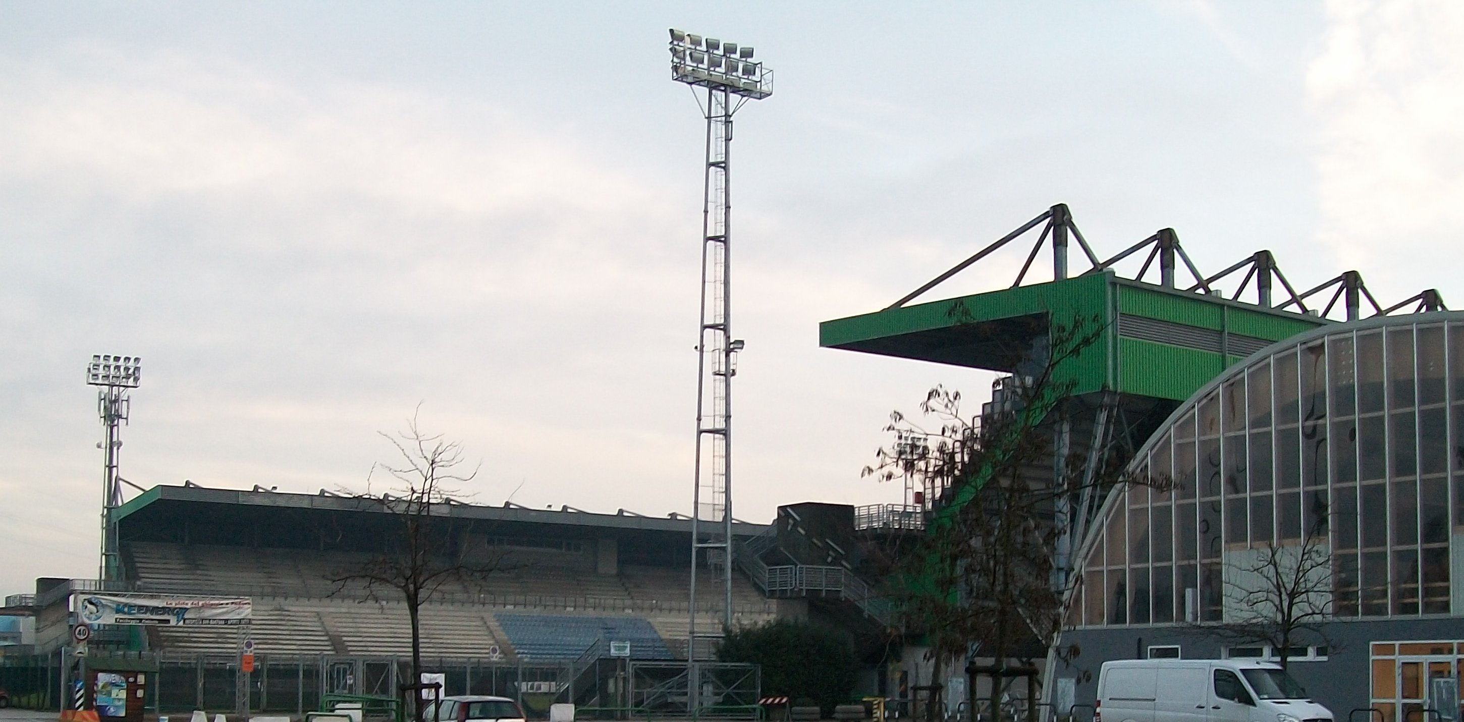 Stadio Plebiscito